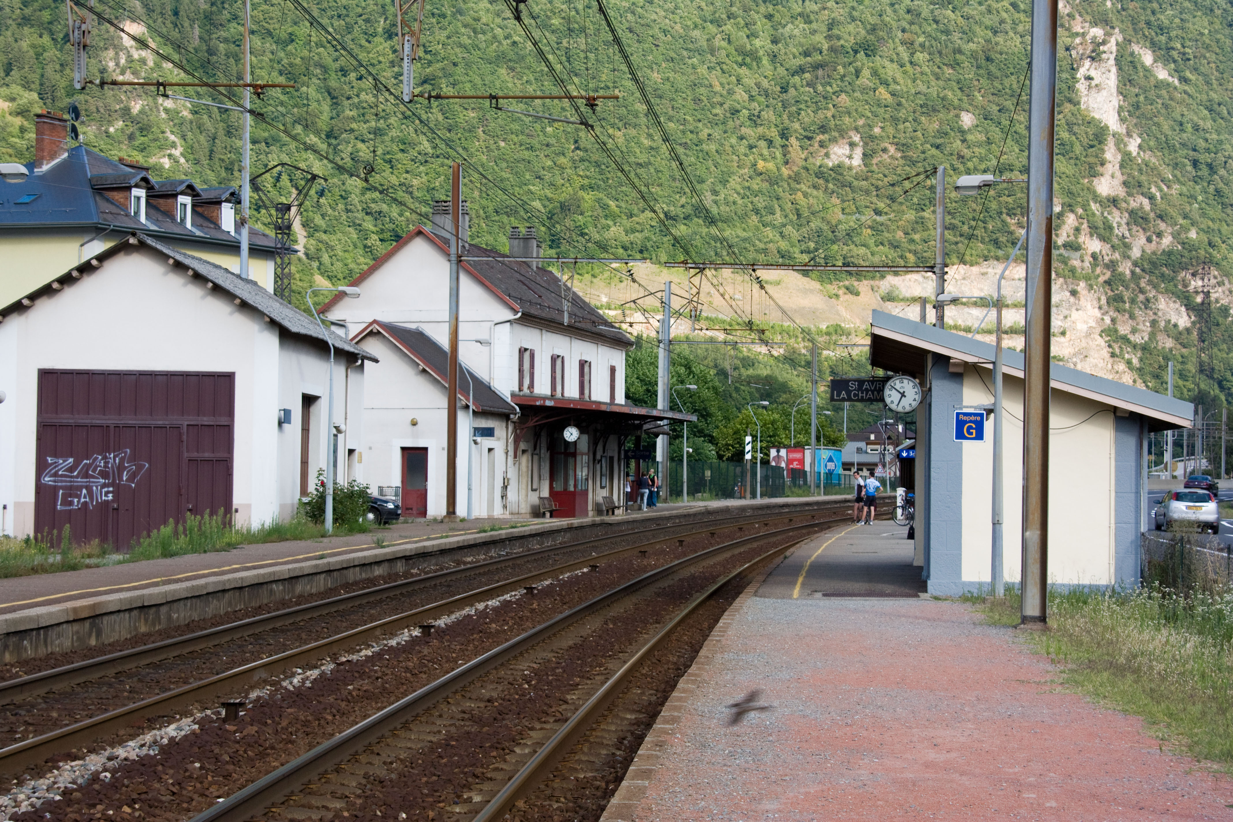 Saint-Avre, Savoie, France